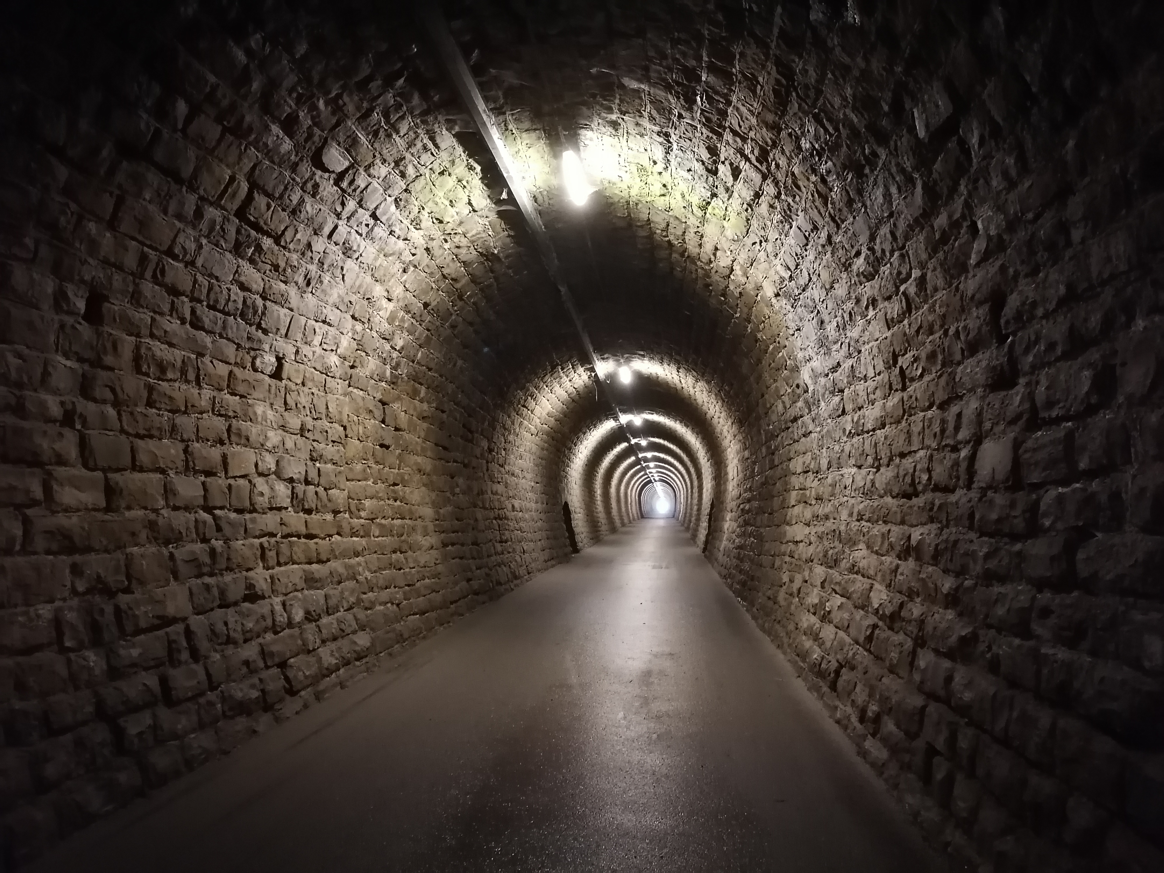 Notranjost 550 metrov dolgega predora Valeta